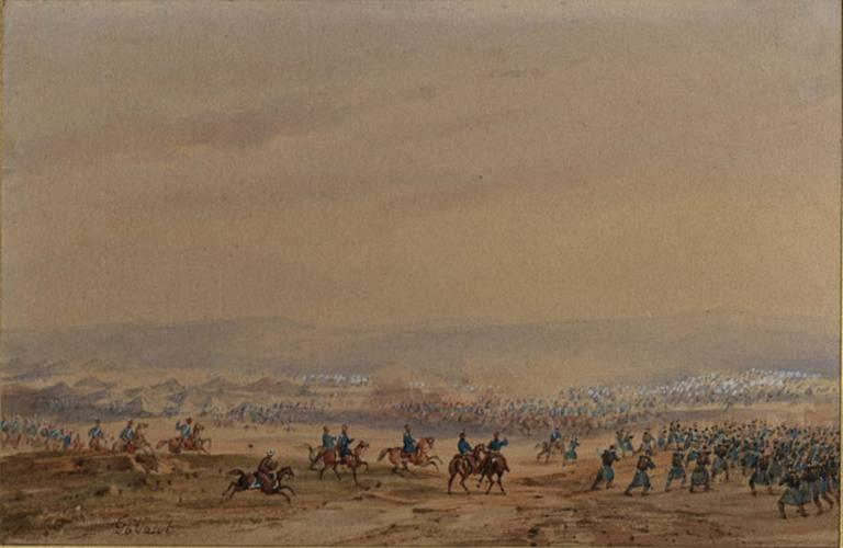 Bataille de Sidi Brahim (1845/09/23-1845/09/25), épisode de la conquête de l'Algérie par la France.